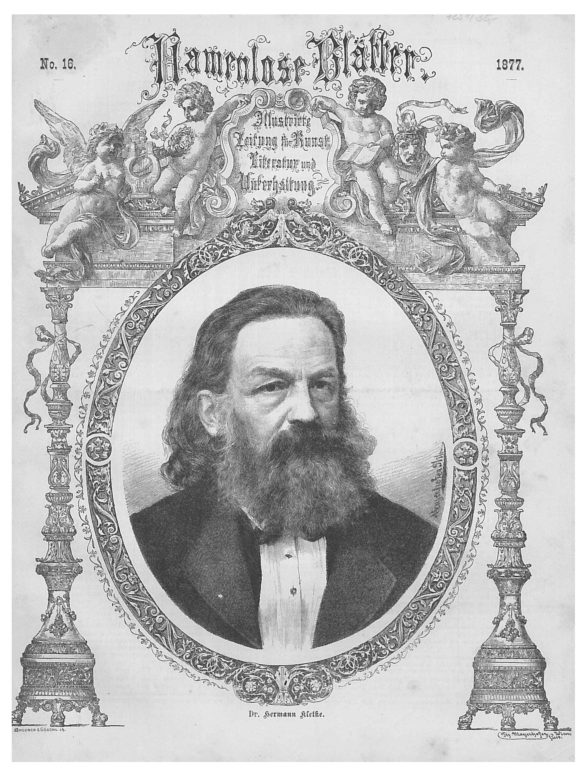 Hermann Kletke Borussiae